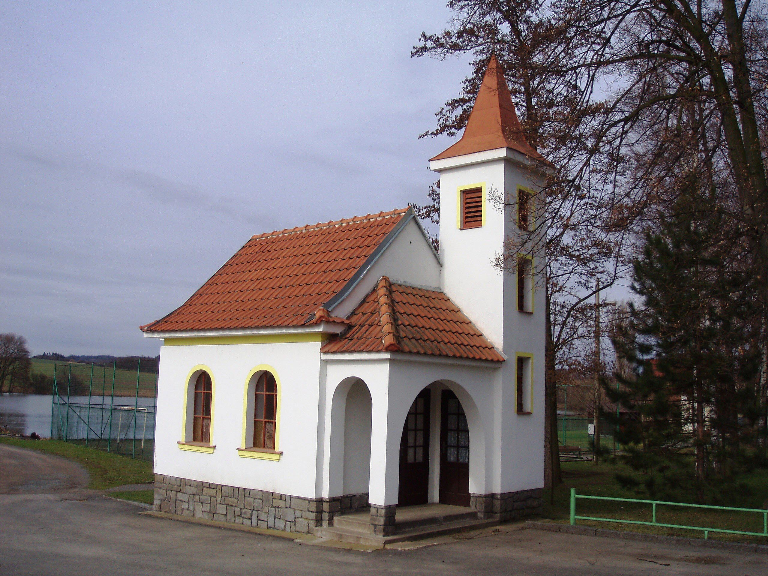 Kotenčice - kaple